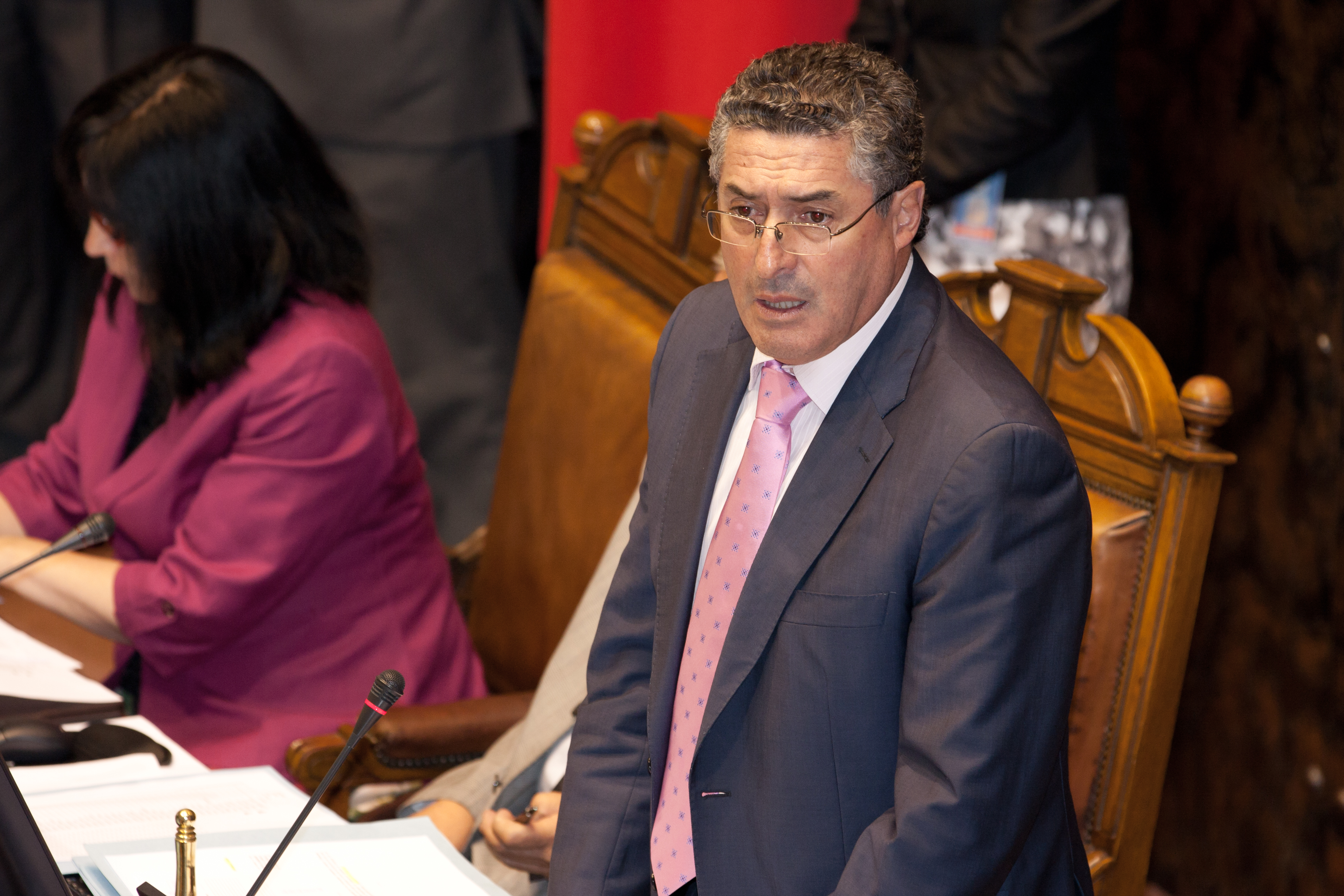 El senador estará en el cargo un año, según lo dispone el acuerdo político comprometido por la Concertación de rotar el cargo entre los partidos que la integran. Además de presidir la mesa de la corporación, forma parte de la Comisión de Derechos Humanos, Nacionalidad y Ciudadanía; y de Régimen Interior de la Cámara Alta.